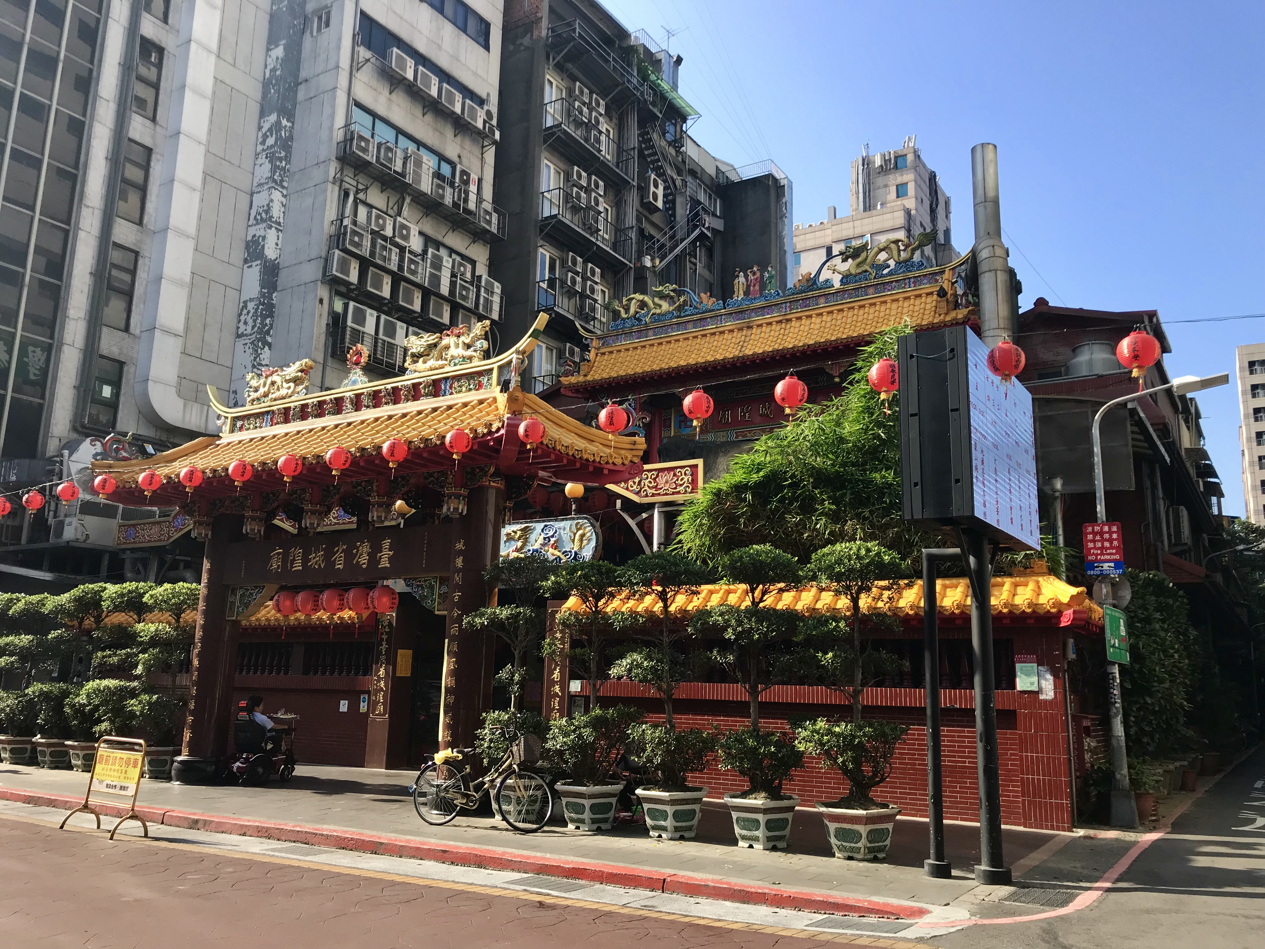 臺灣省城隍廟斜照